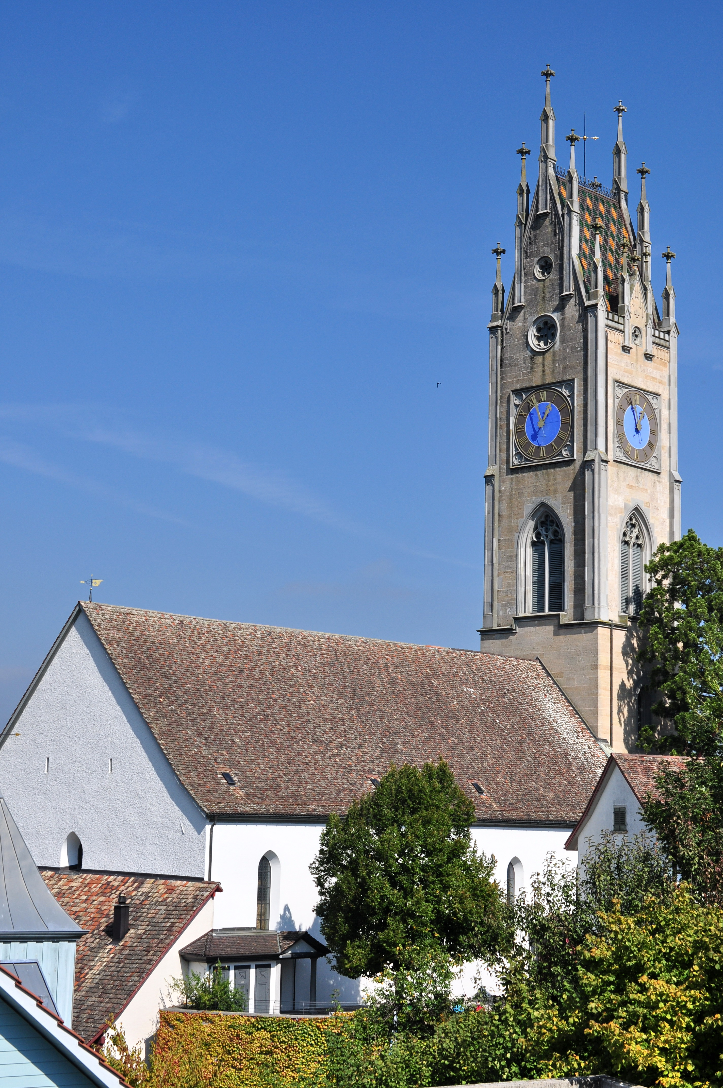 Reformierte Kirche in Andelfingen (Switzerland)